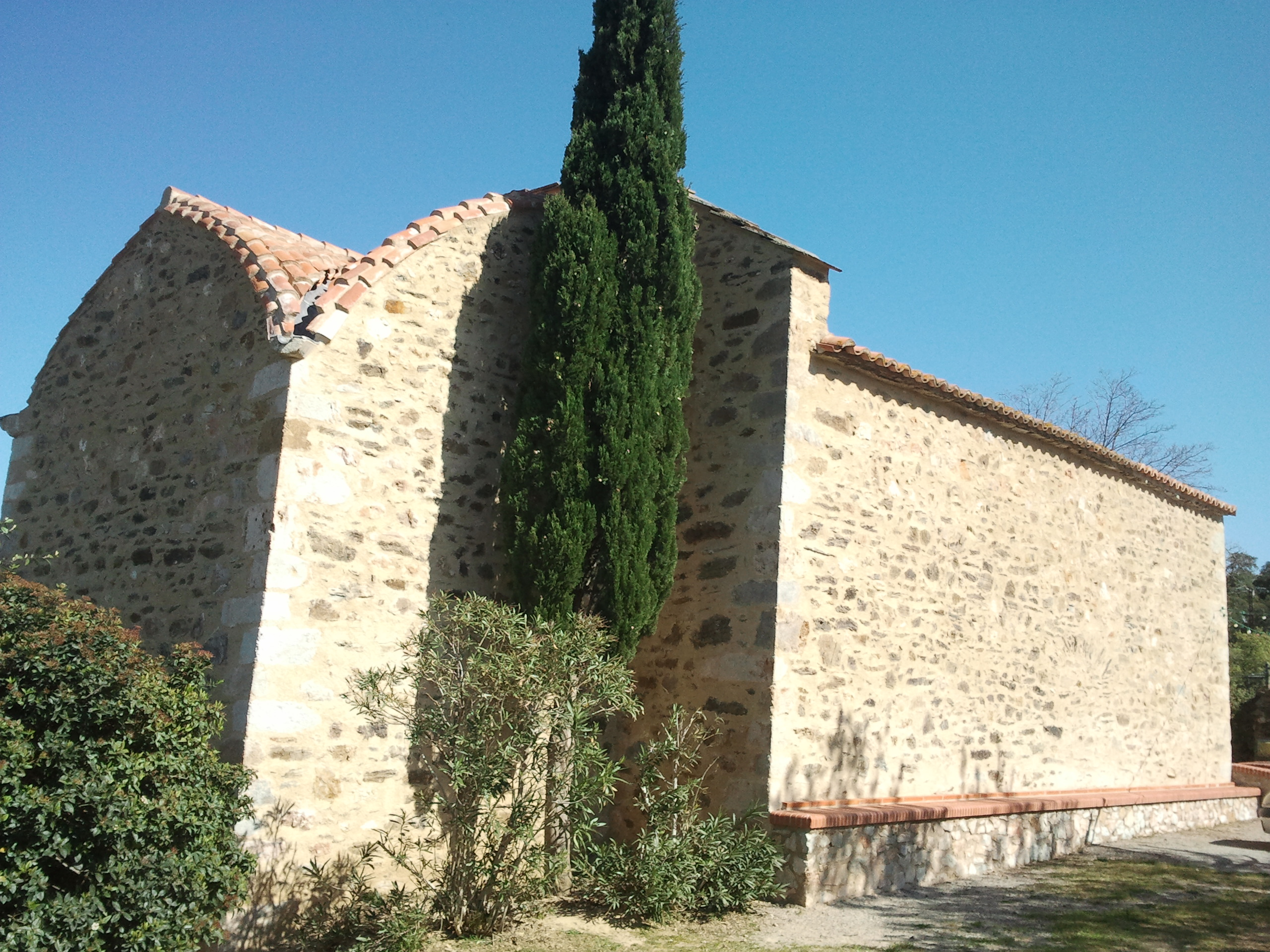 Faces nord et ouest de l'église Saint-Nazaire de Tordères